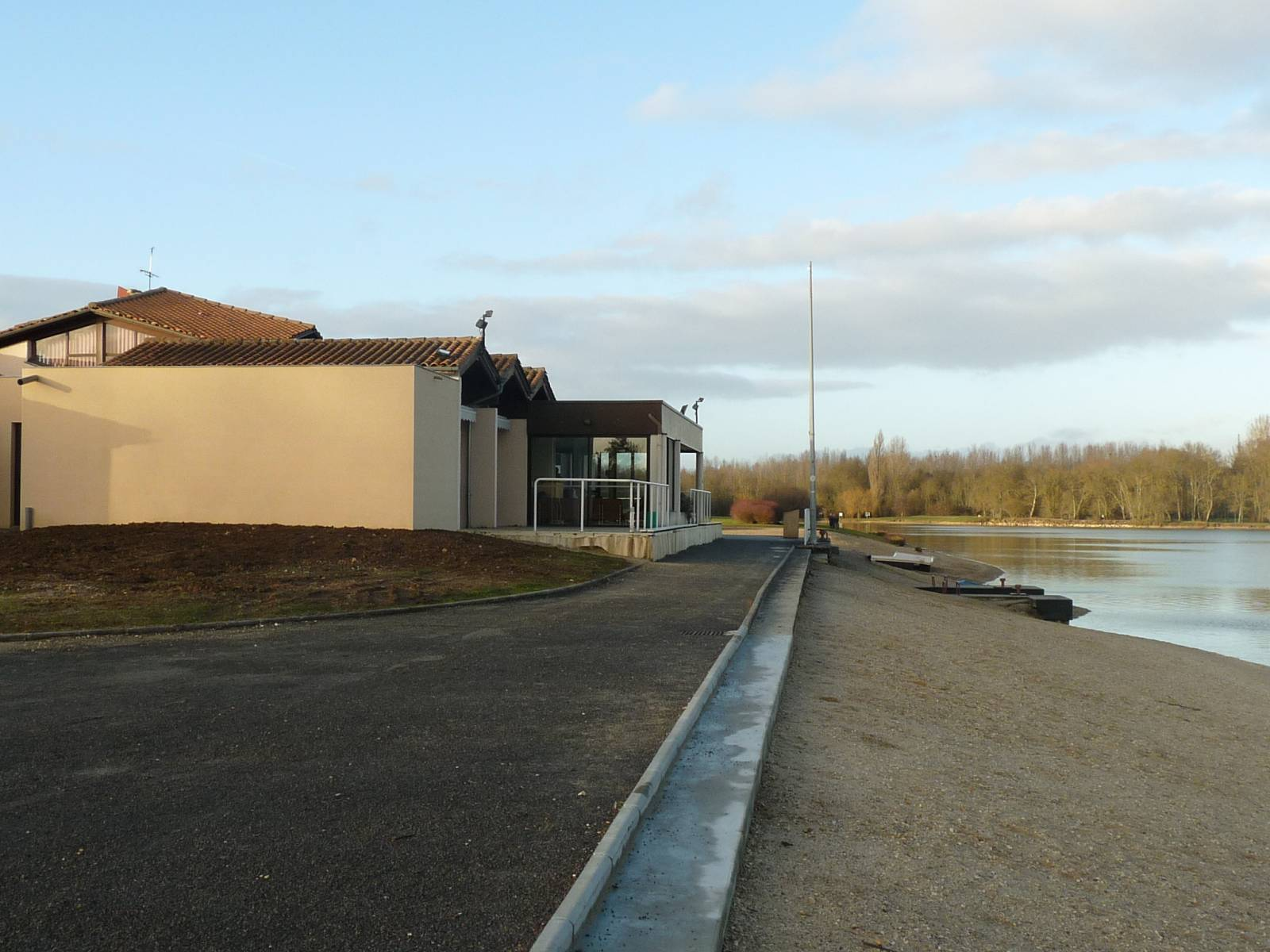 plan d'eau de la Grande Prairie à St-Yrieix (16), France